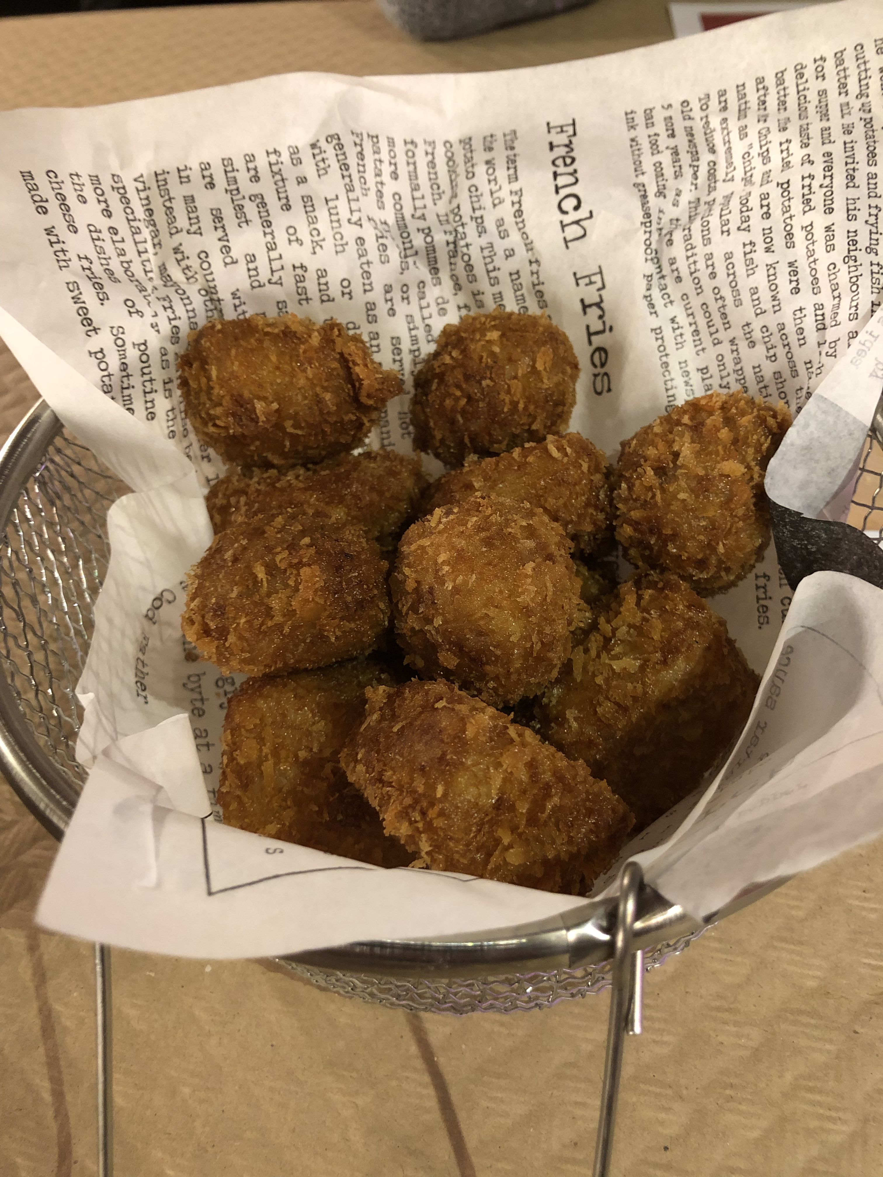 Croquetas de Jamón y cecina